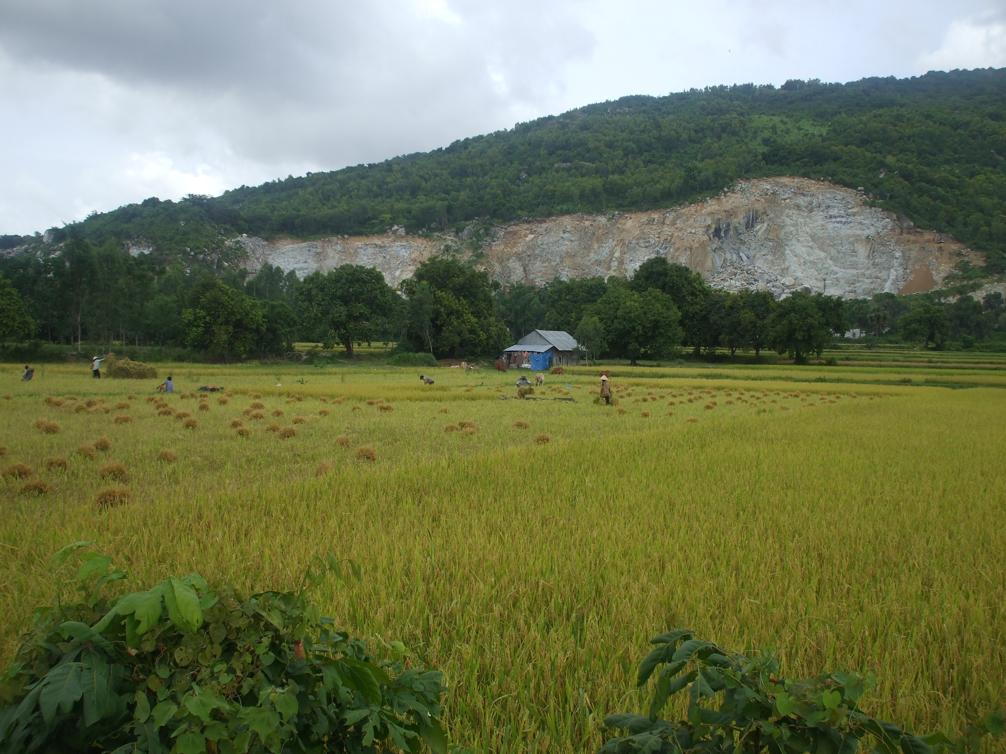 Một góc núi Cô Tô (An Giang) bị khai thác đá, bên cánh đồng lúa vào mùa gặt